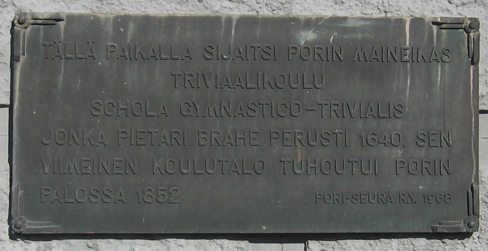 Triviaalikoulun kyltti Porin Hallituskadulla